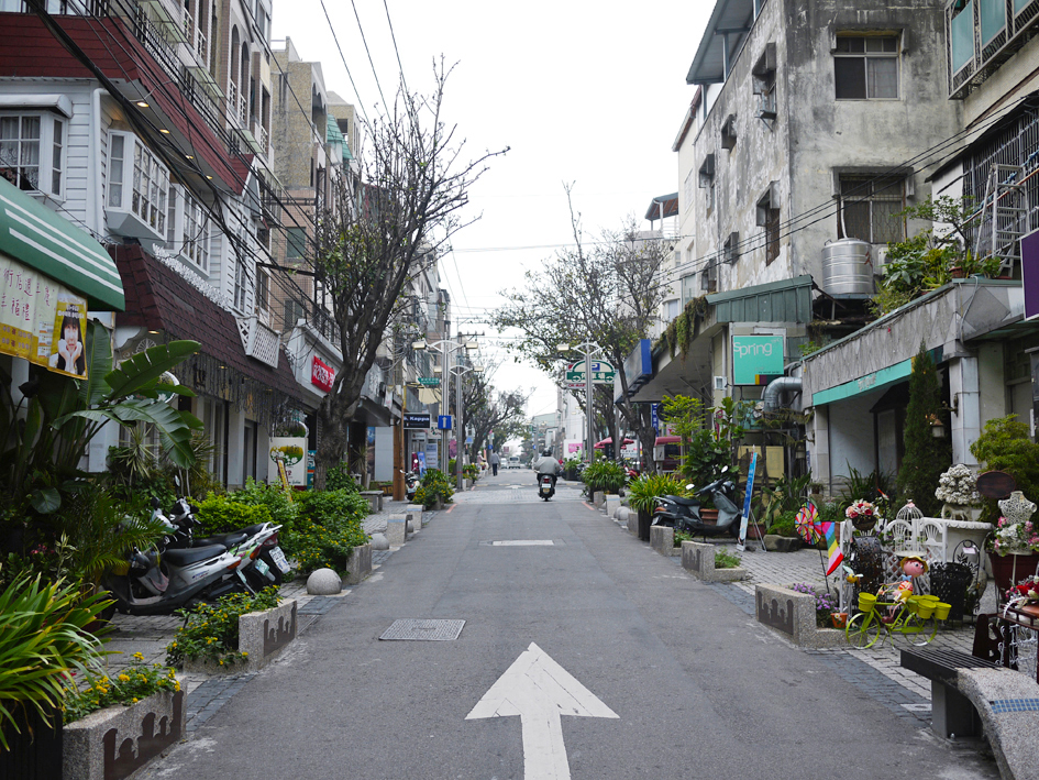 中文（台灣）: 東海藝術街商圈